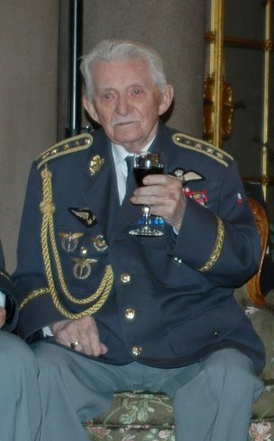 General-polkovnik František Fajtl a Gen. Por. František Peřina